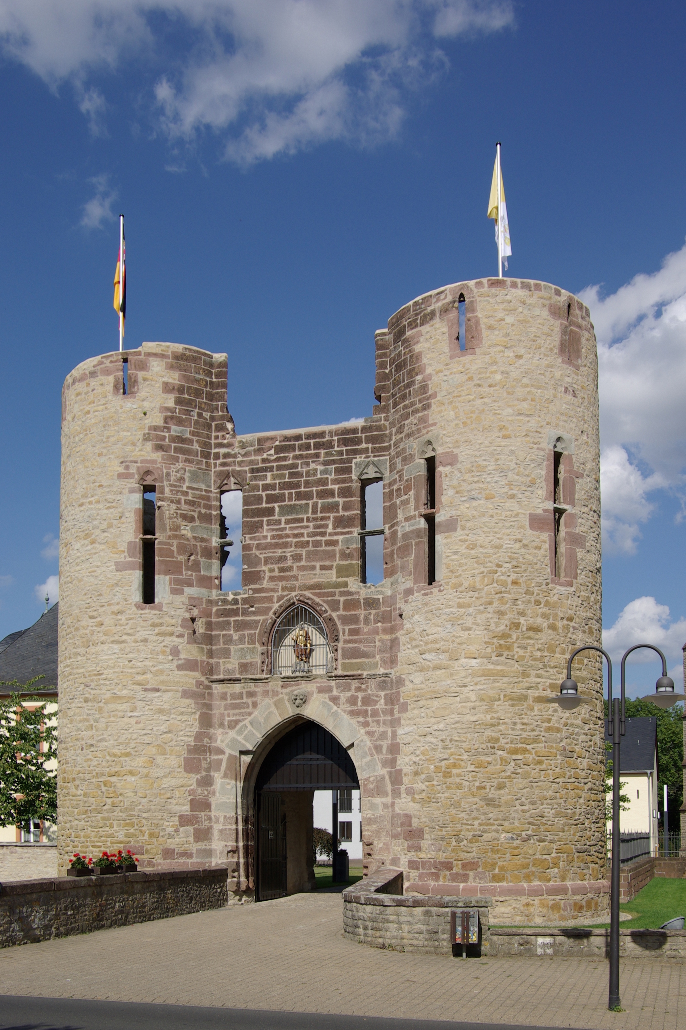 Welschbillig, gotischer Torbau der ehemaligen erzbischöflichen Wasserburg, 13. Jahrhundert, 1673 zerstört